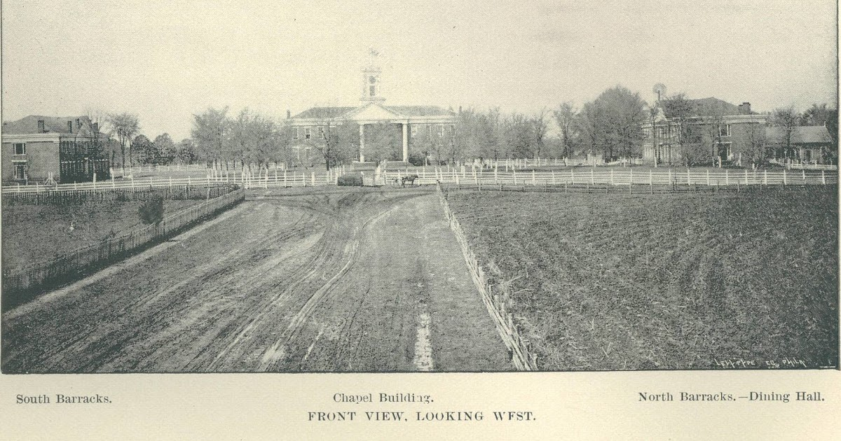 马里昂军事学院校园，1890年代